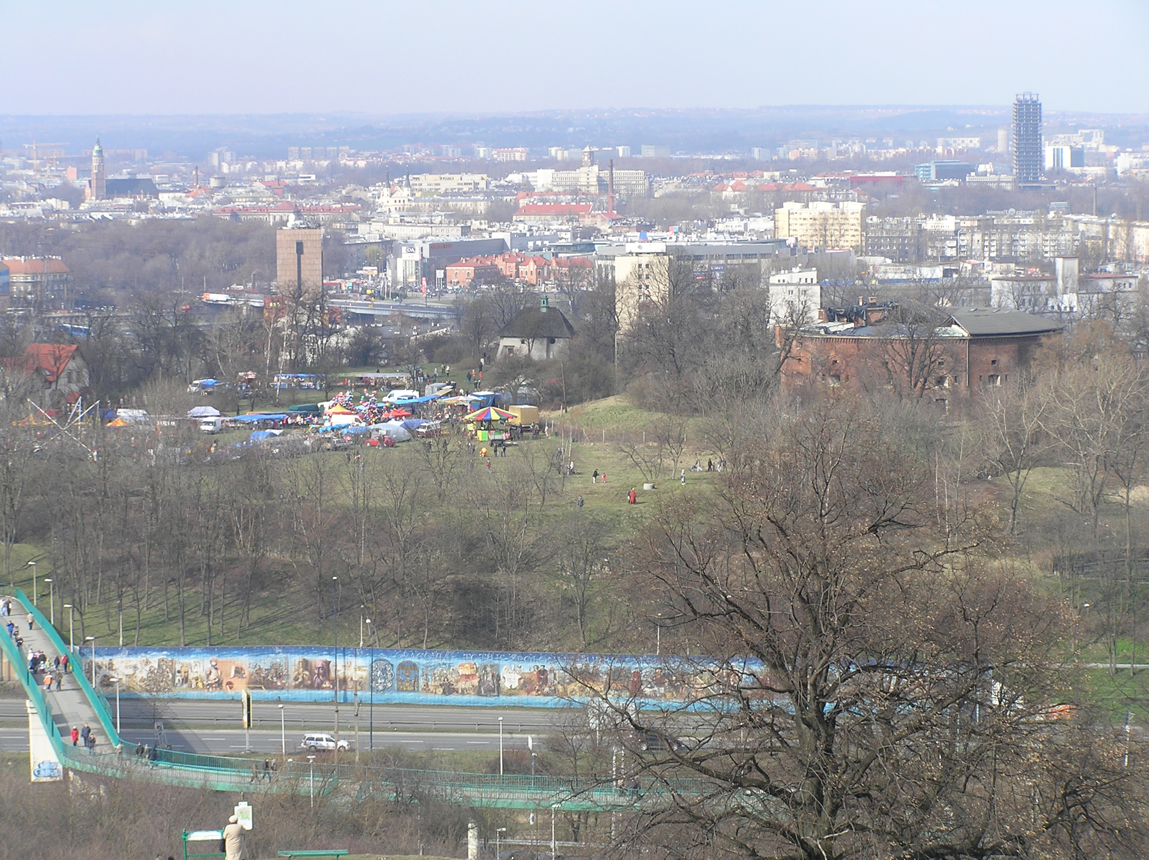 Kraków - Rękawka 2008 - festival - Wzgórze Lasoty - view from Kopiec Krakusa